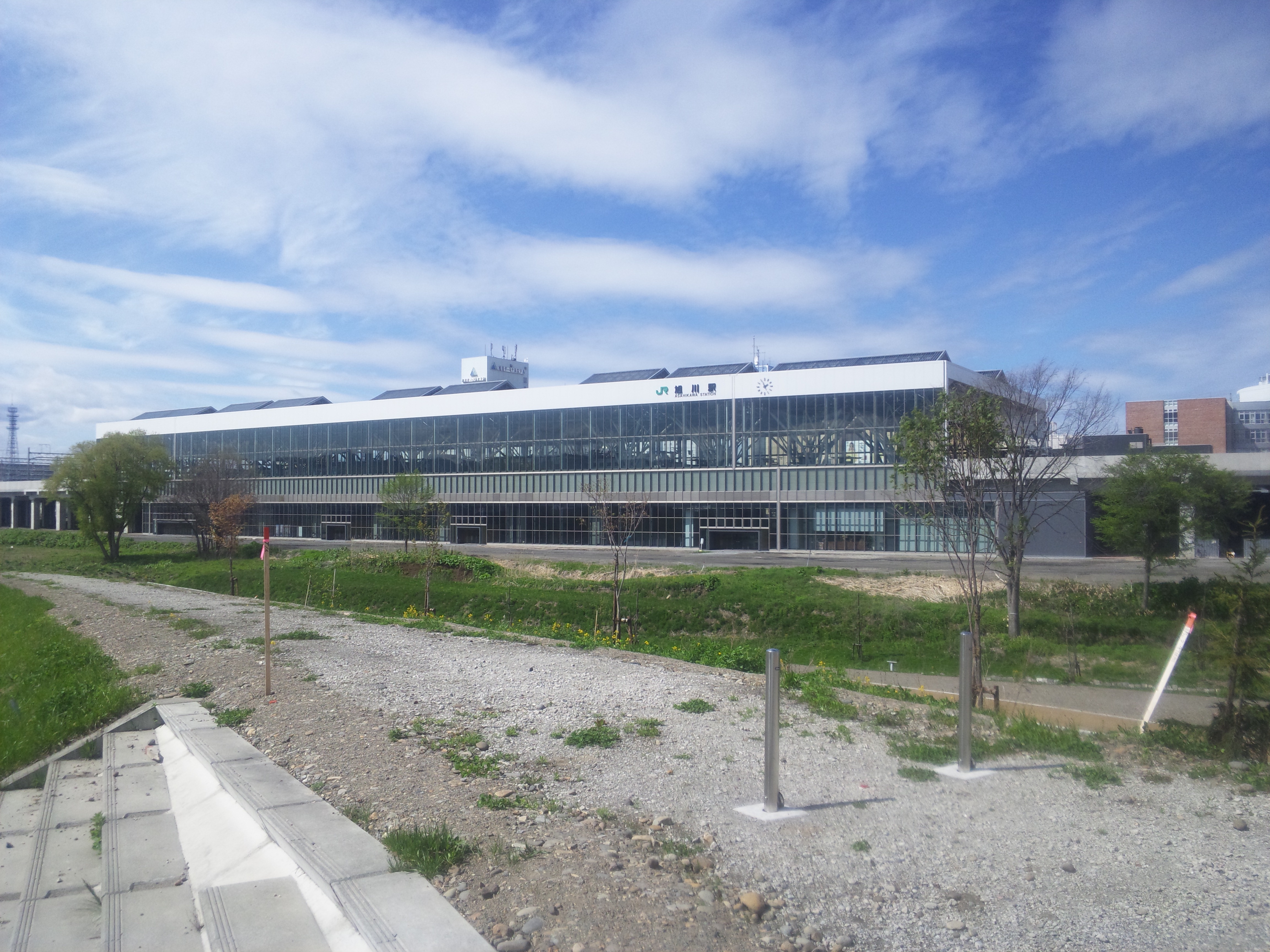 旭川駅（氷点橋より撮影）